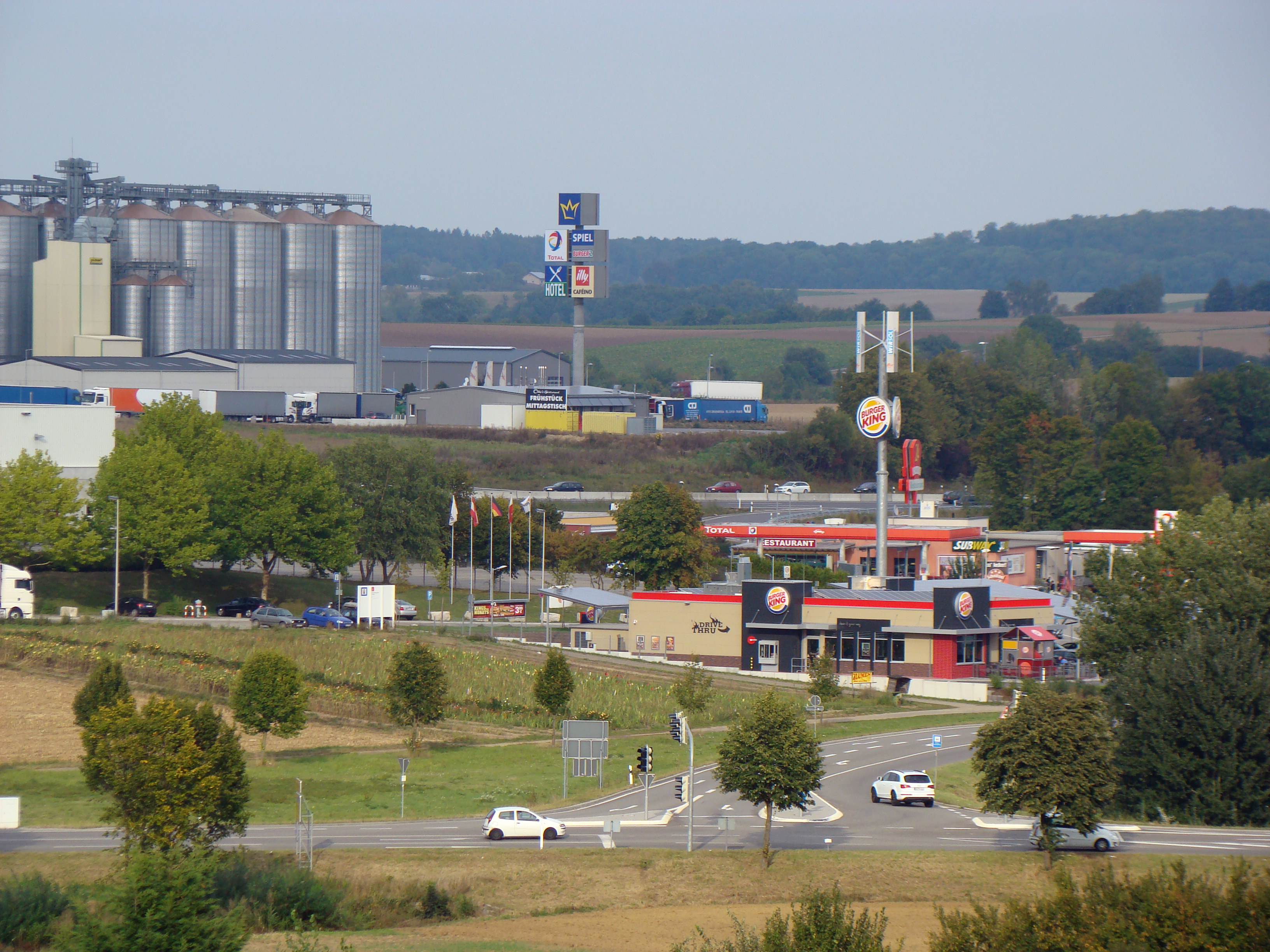 Autohof in Bad Rappenau-Fürfeld